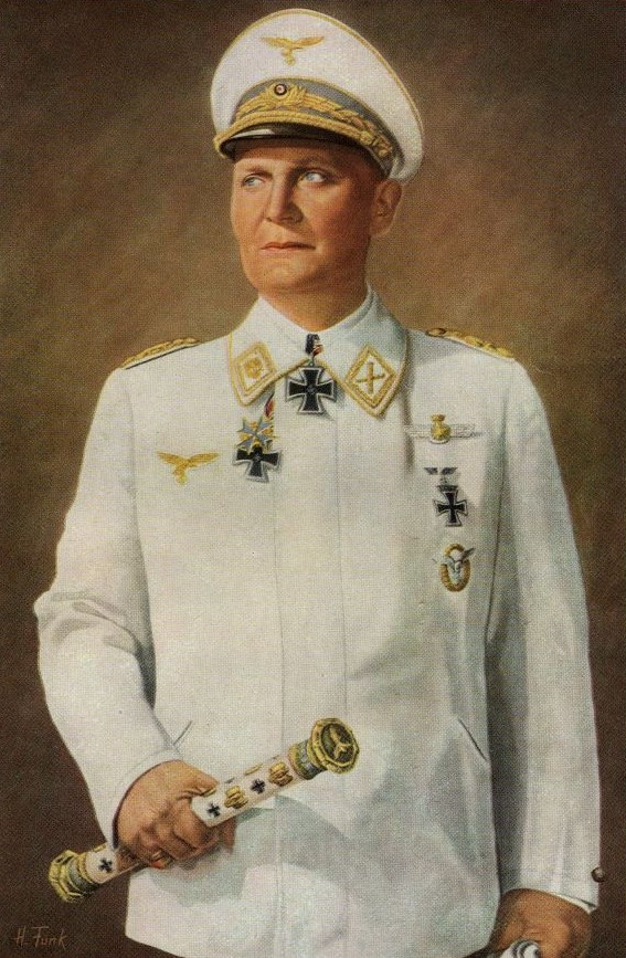 ritratto di Hermann Göring